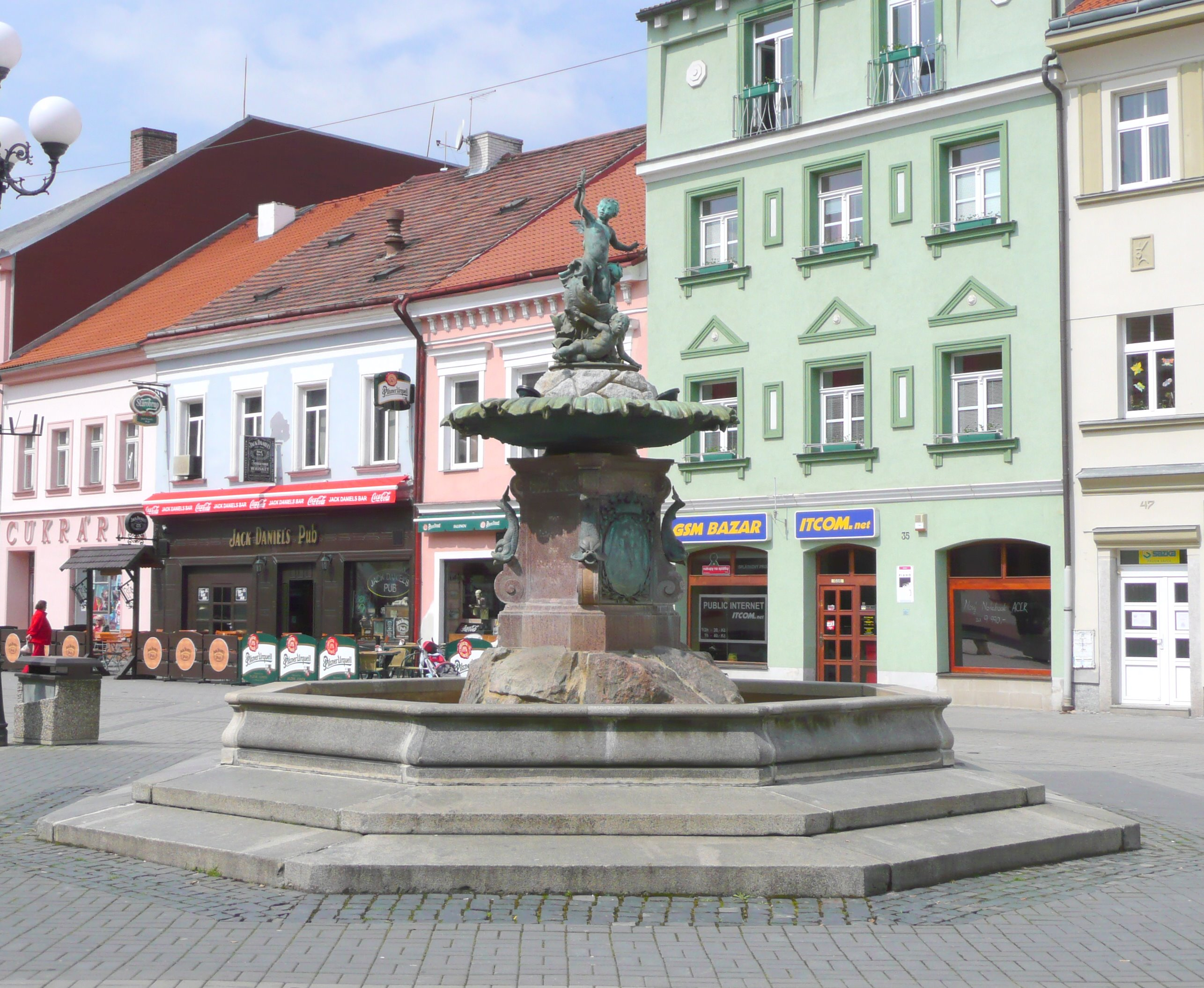 Jubilejní kašna na Starém náměstí v Sokolově